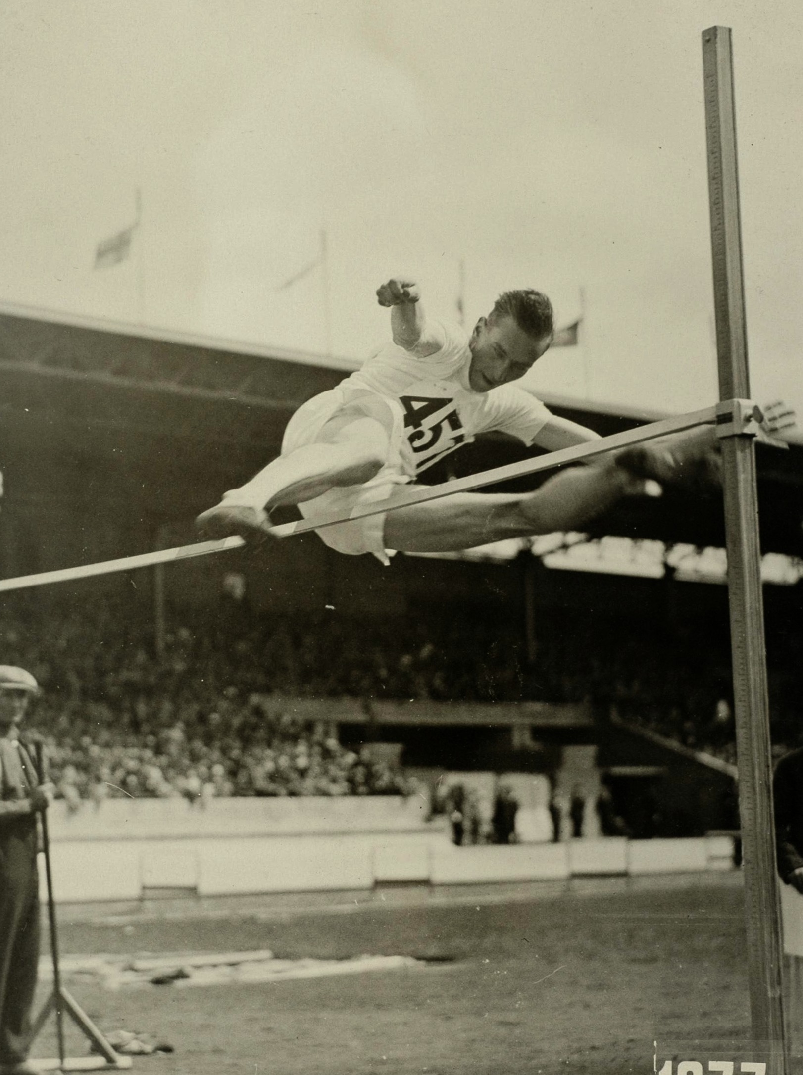 Sport. Sport, Olympische Spelen Amsterdam, 1928 : De Engelse hoogspringer Colin Gordon in actie.